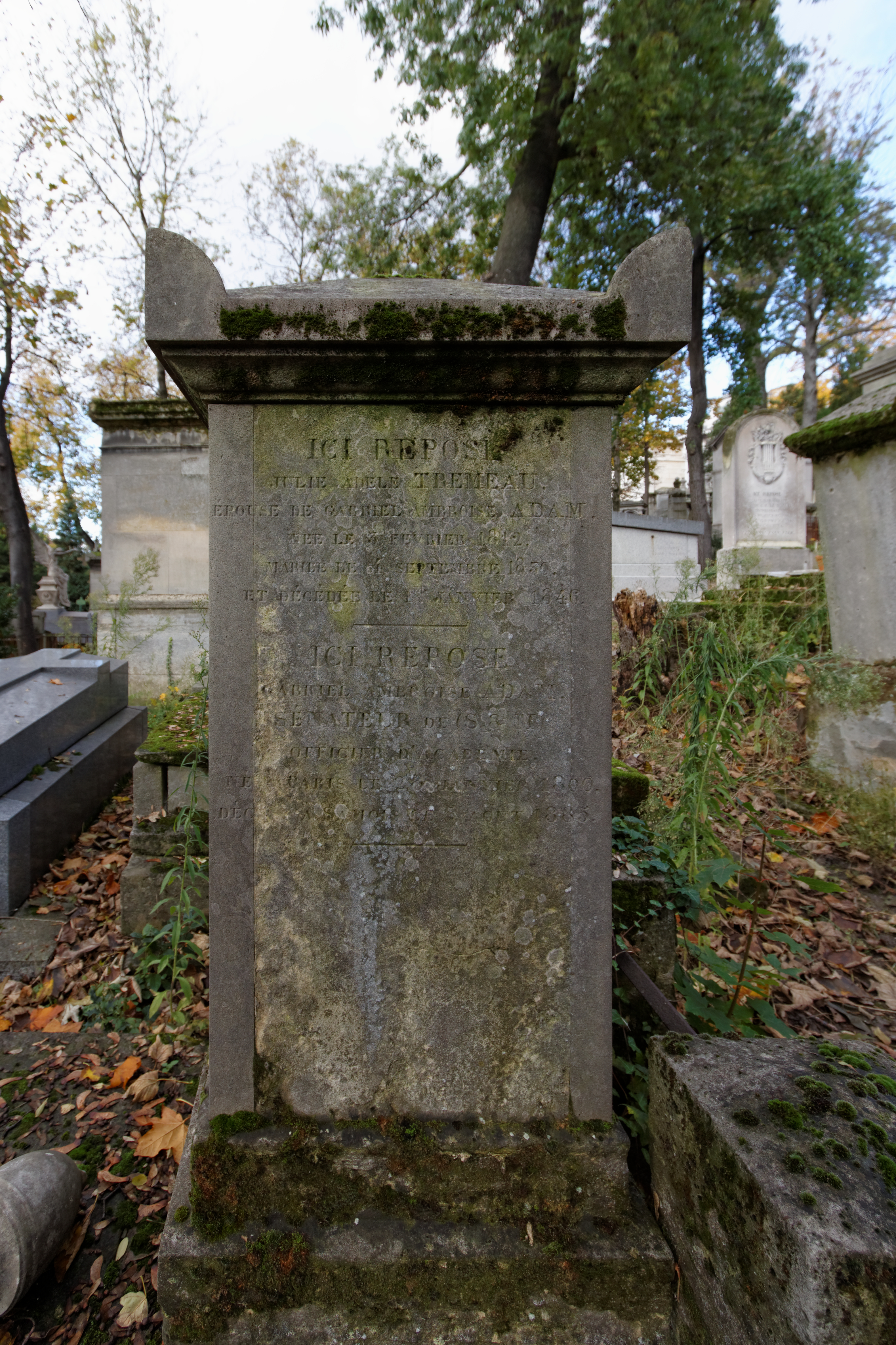 Sépûlture de Charles Clément Balvay, dit Bervic (1756-1822), graveur ; Gabriel Adam (1800-1885), sénateur de Seine-et-Marne.